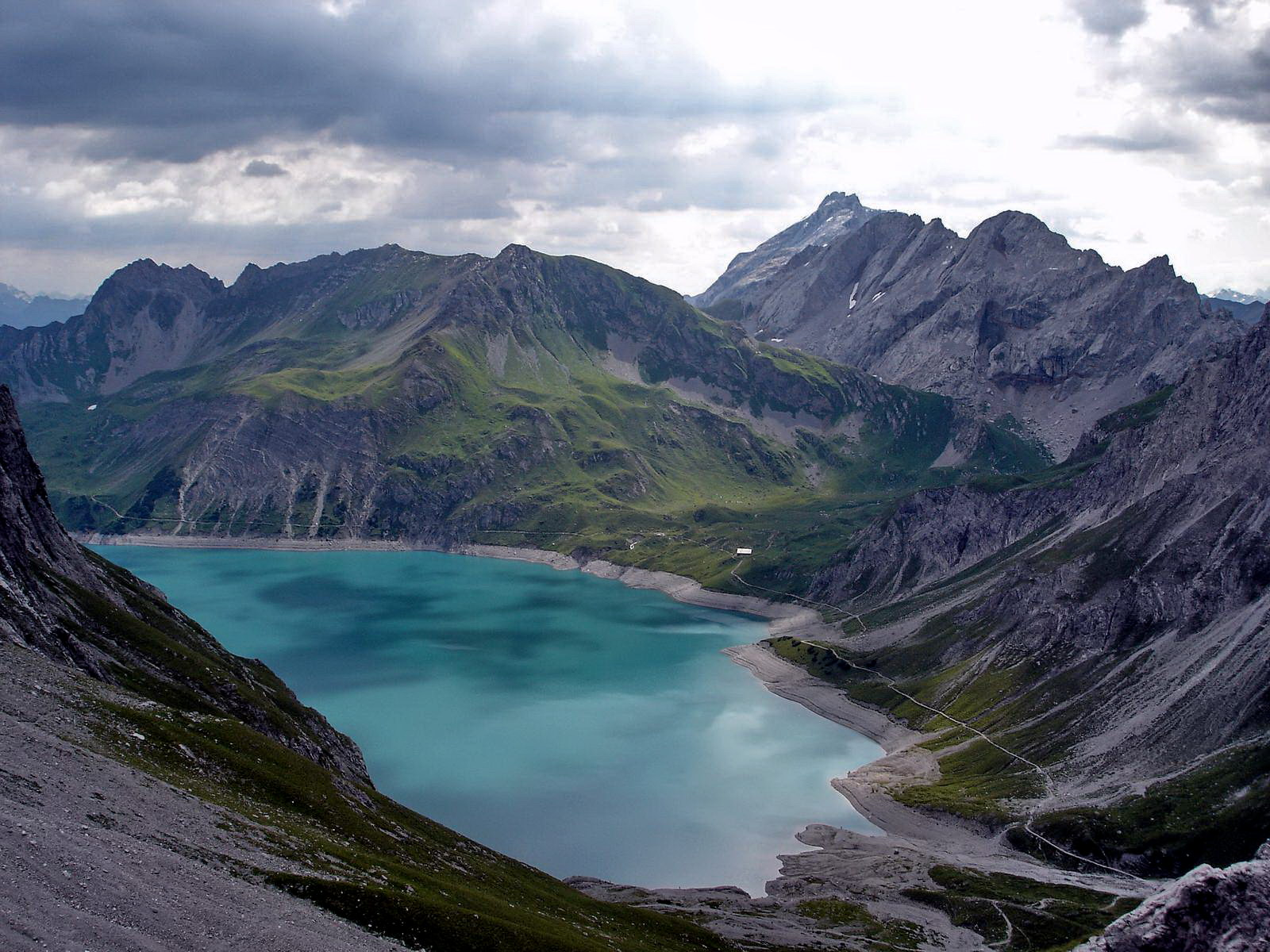 Lünersee, Lünerseewerk, Vorarlberg